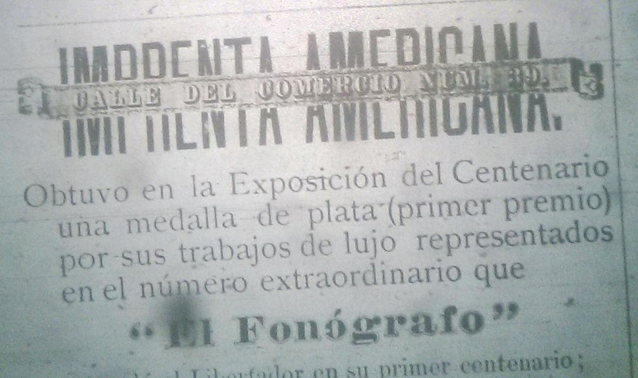 Noticia aparecida en el diario "El Fonógrafo", sobre el Premio ganado por la "Imprenta Americana" de Maracaibo, en la Exposición Nacional de Venezuela de 1883. La exposición se realizó con motivo del centenario del natalicio de Simón Bolívar y el premio fue otorgado por la edición especial del diario dedicada al centenario.